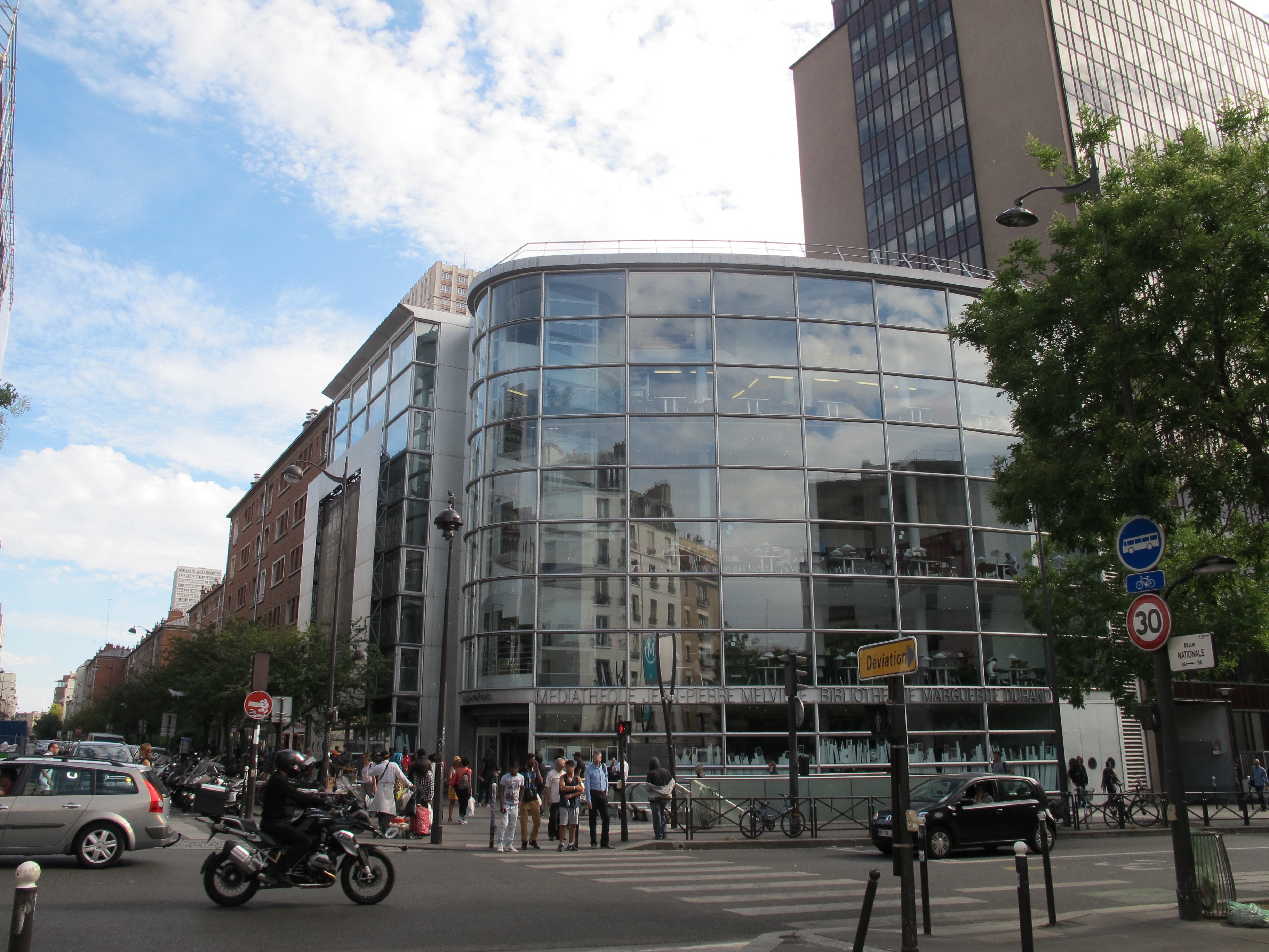 Médiathèque Jean-Pierre-Melville et bibliothèque Marguerite-Durand, n° 79 rue Nationale (Paris, 13e).